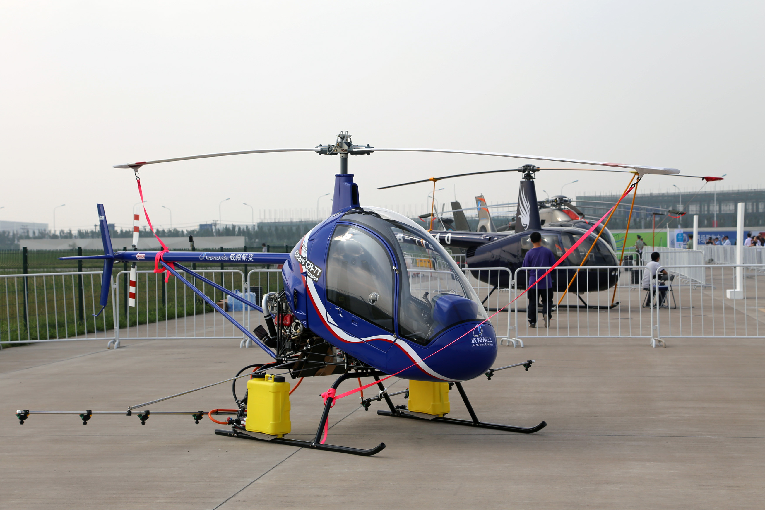 Cicaré CH-7T (Tandem)